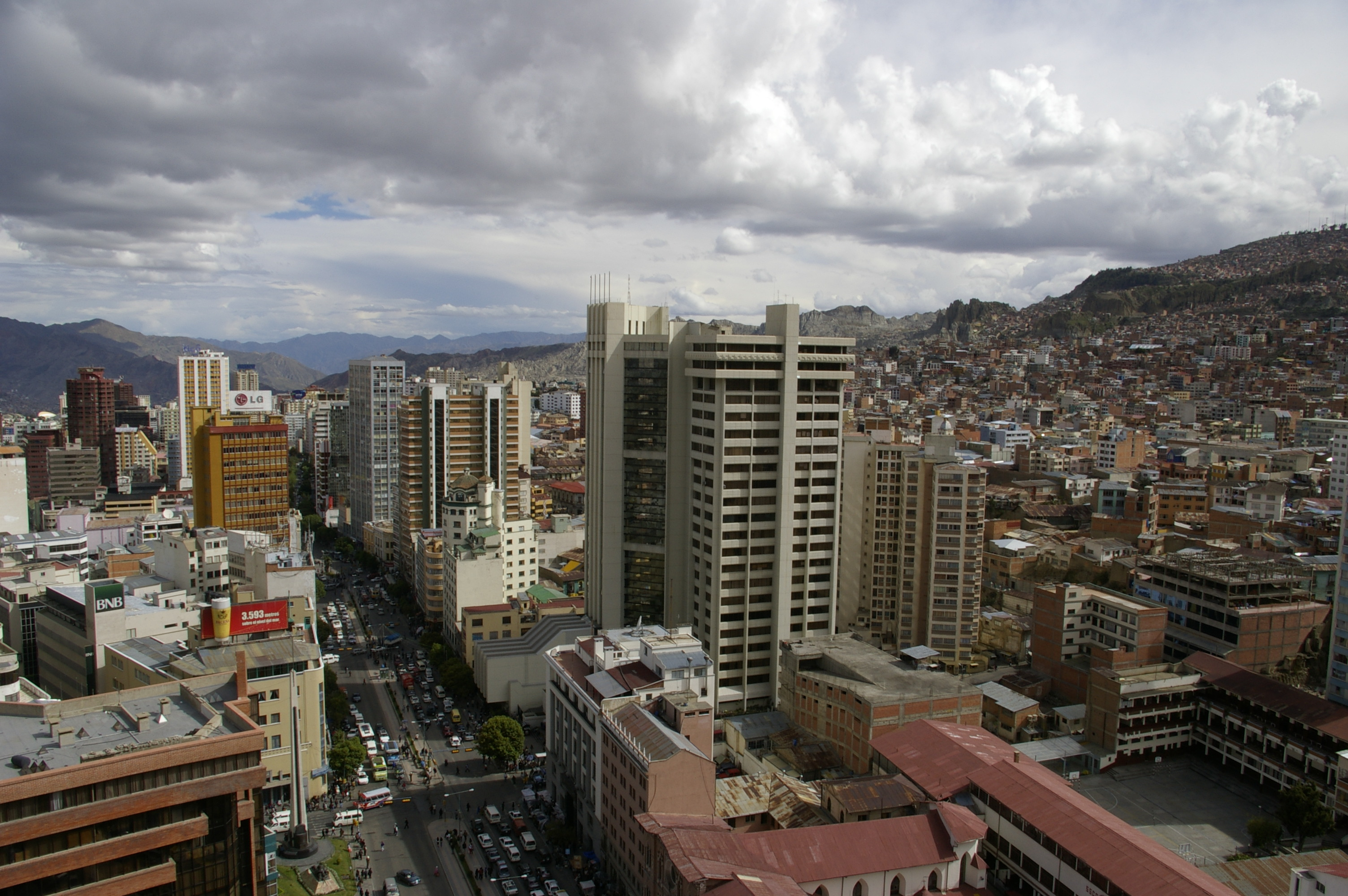 La Paz, Bolivia